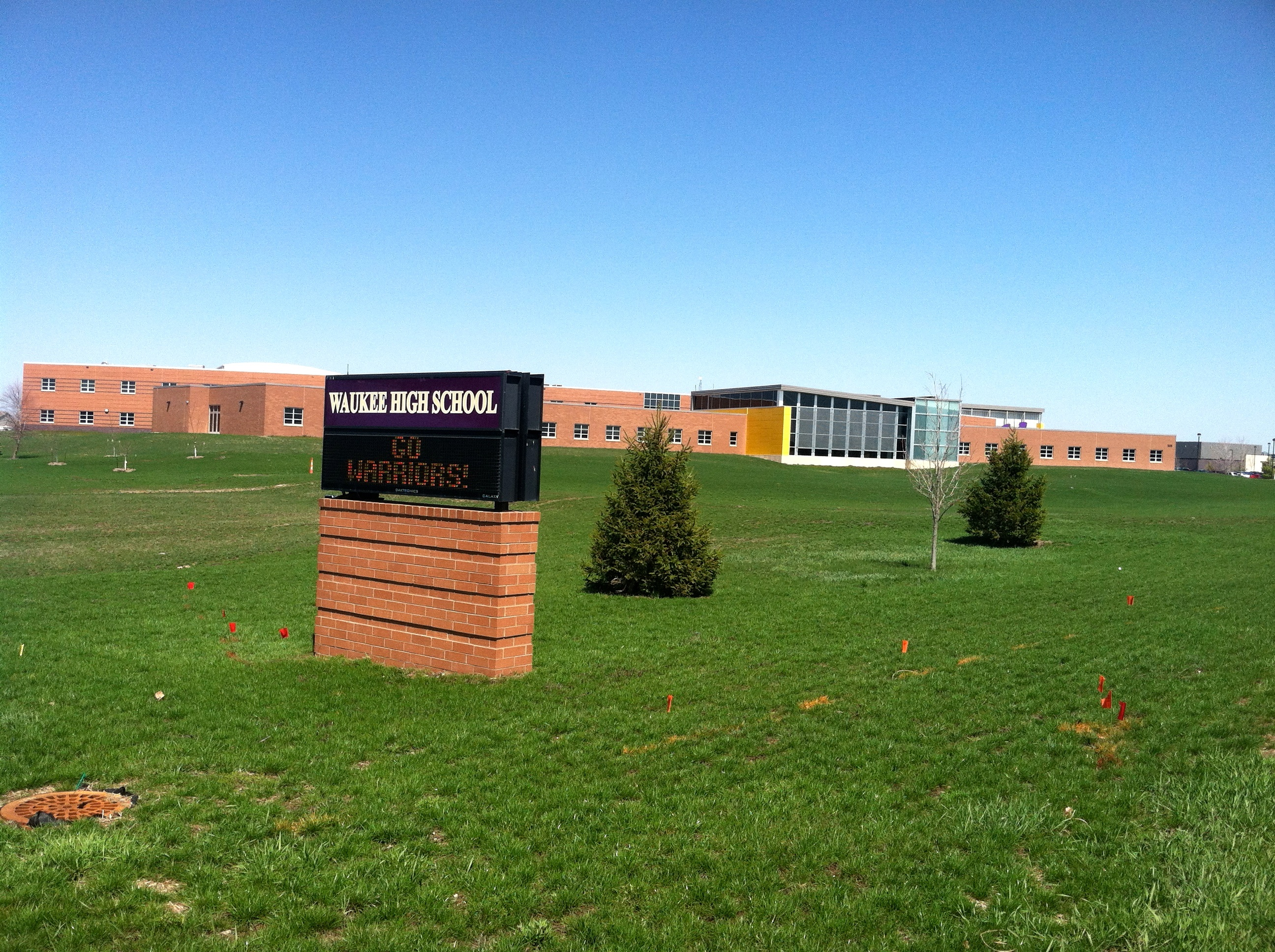 Waukee Highschool